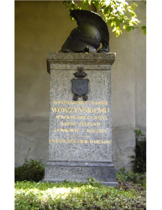 Dresden Alter Kath. Friedhof, Grab des poln. Generals Stanislaw Skarbek-Woyczynski